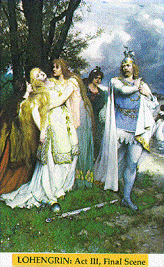 Ferdinand Leeke 1859-1925: Lohengrin